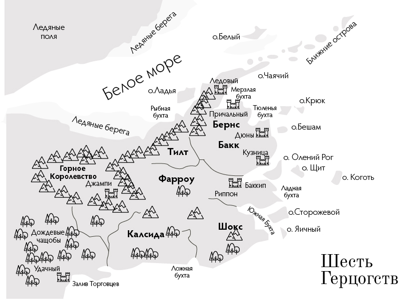 Карта королевств, описанных в романах Робин Хобб